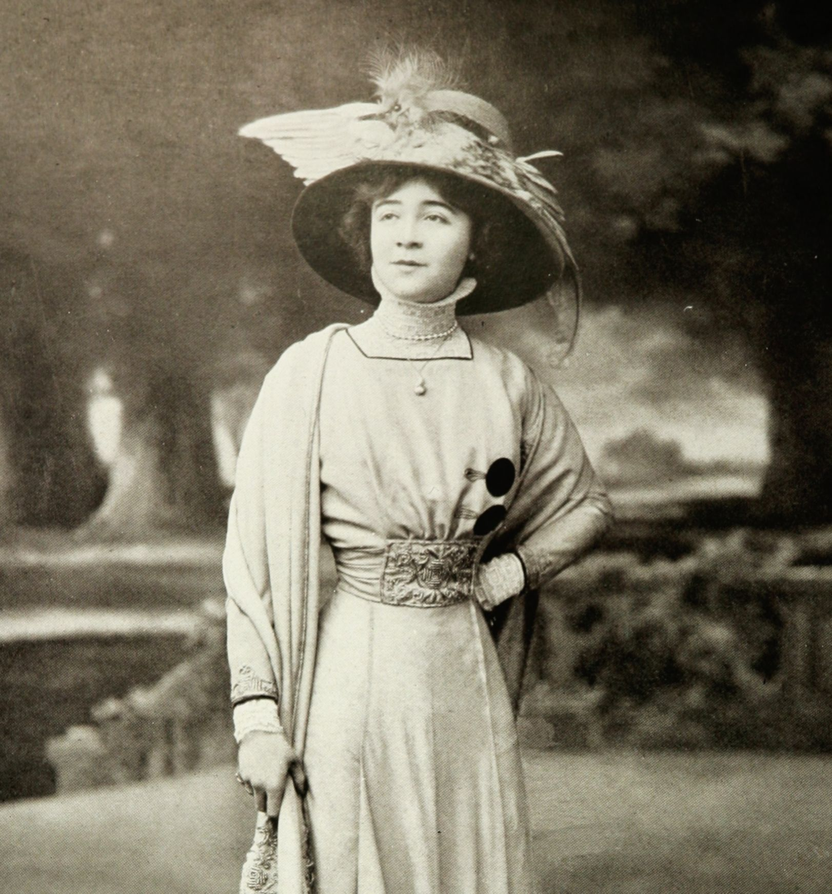 Photographie de Juliette Clarens , parue dans "Les Modes" de août 1909